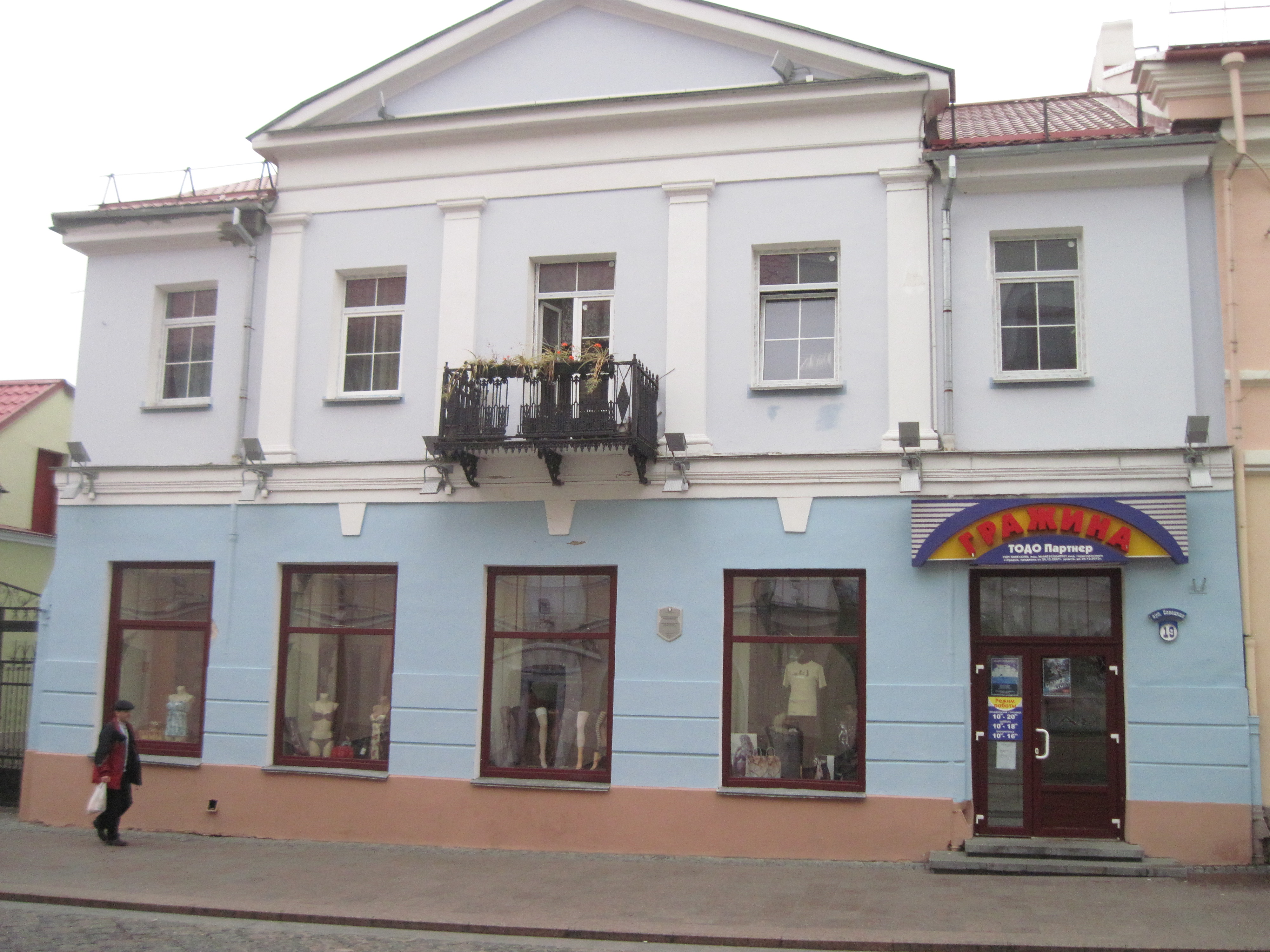 Беларуская (тарашкевіца): Выява дому №19 па вуліцы Савецкая, Гродна